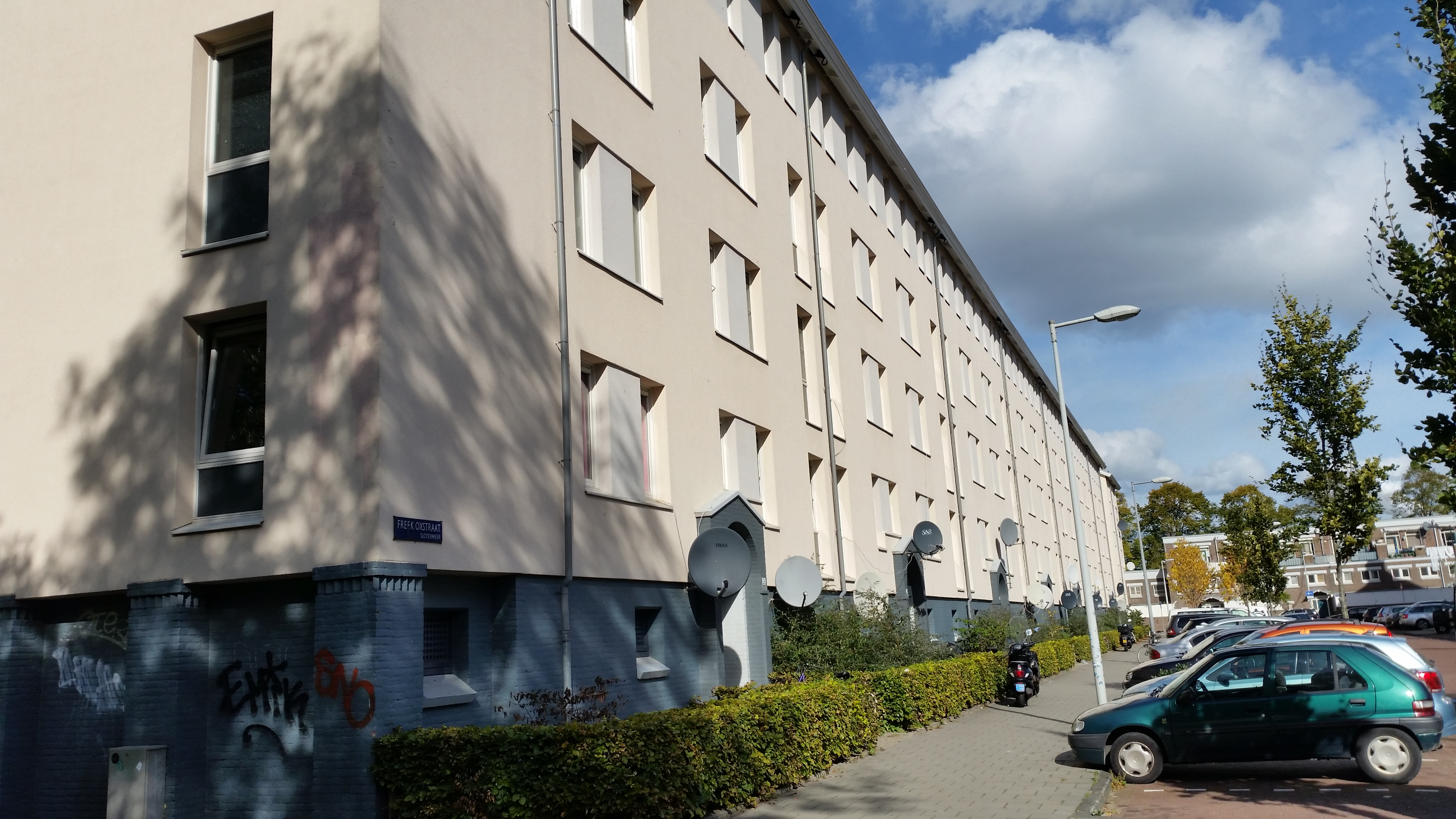 Freek Oxstraat, Amsterdam, even zijde van Evers en Sarlemijn